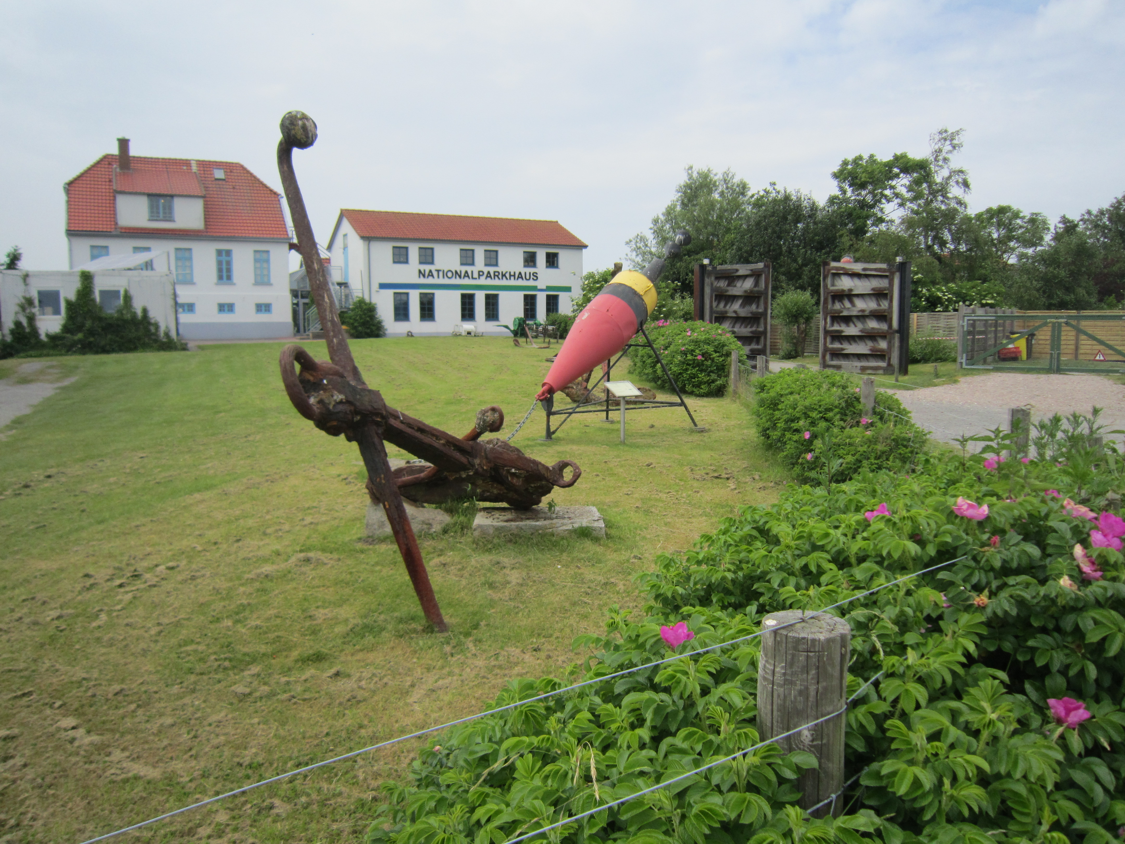 Rückseite des Nationalparkhauses Fedderwardersiel an der Wesermündung mit Freigelände